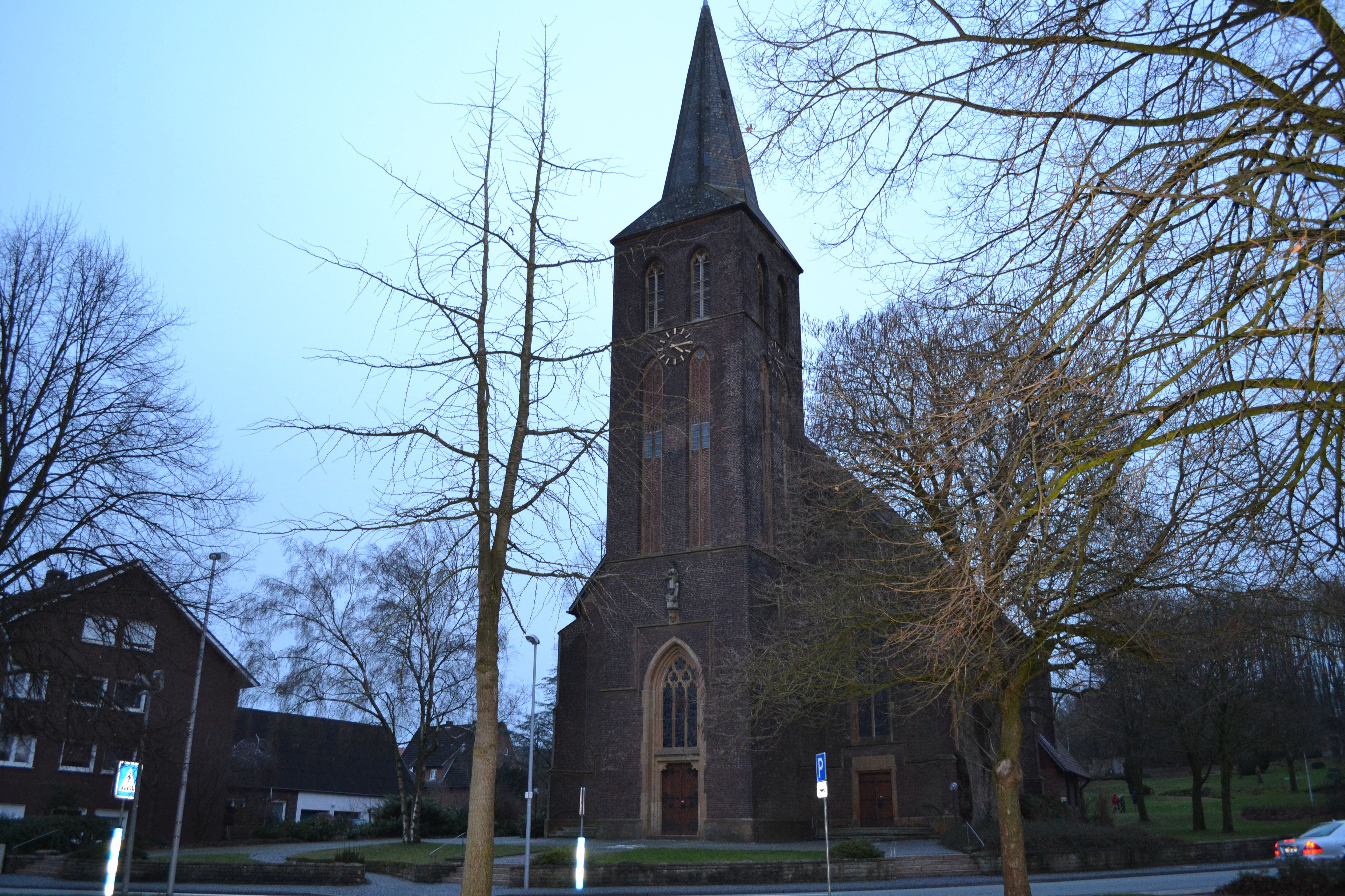 Ostenfelde, Kath. Kirche St. Magaretha